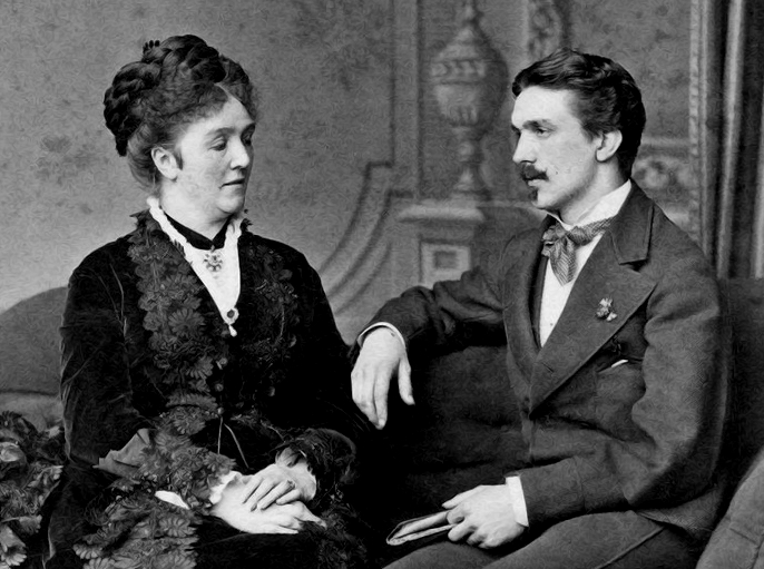 Arcadie Claret (1826-1897) et son fils Arthur von Eppinghoven (1852-1940)